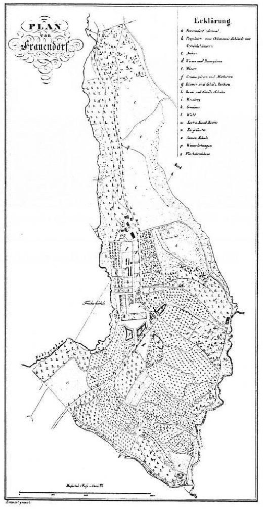 Plan von Frauendorf